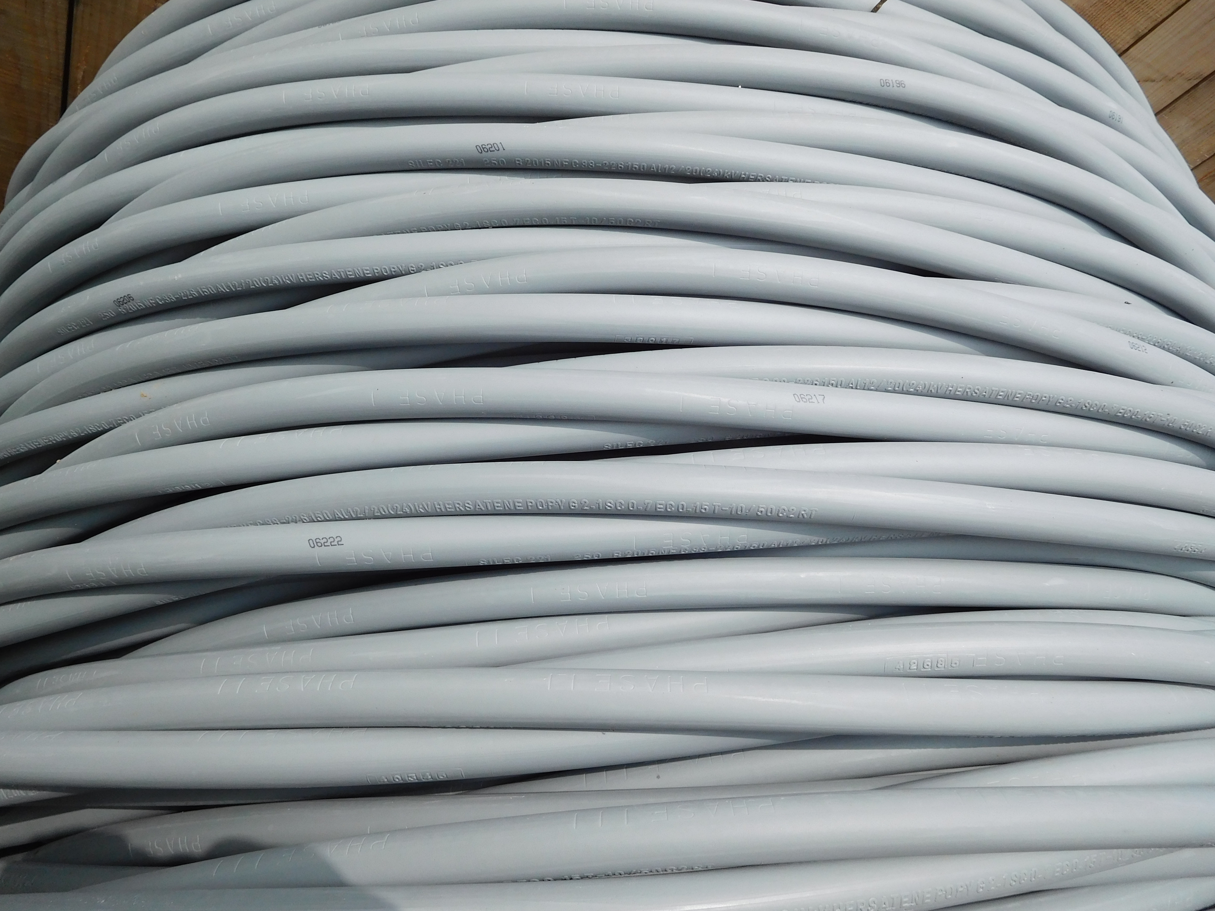 Câbles gris d'alimentation souterrains Hersatene (isolant TR XLPE, à base de polyéthylène réticulé), à conducteur en aluminium, pour réseau de distribution à 20 kV (HTA, moyenne tension), pour courant triphasé (marquage : « phase I » ou « phase II » ou « phase III » sur chaque câble), enroulés sur une bobine, fabriqués par General Cable. Photo prise à Ménétréol-sous-Sancerre (Cher, France).